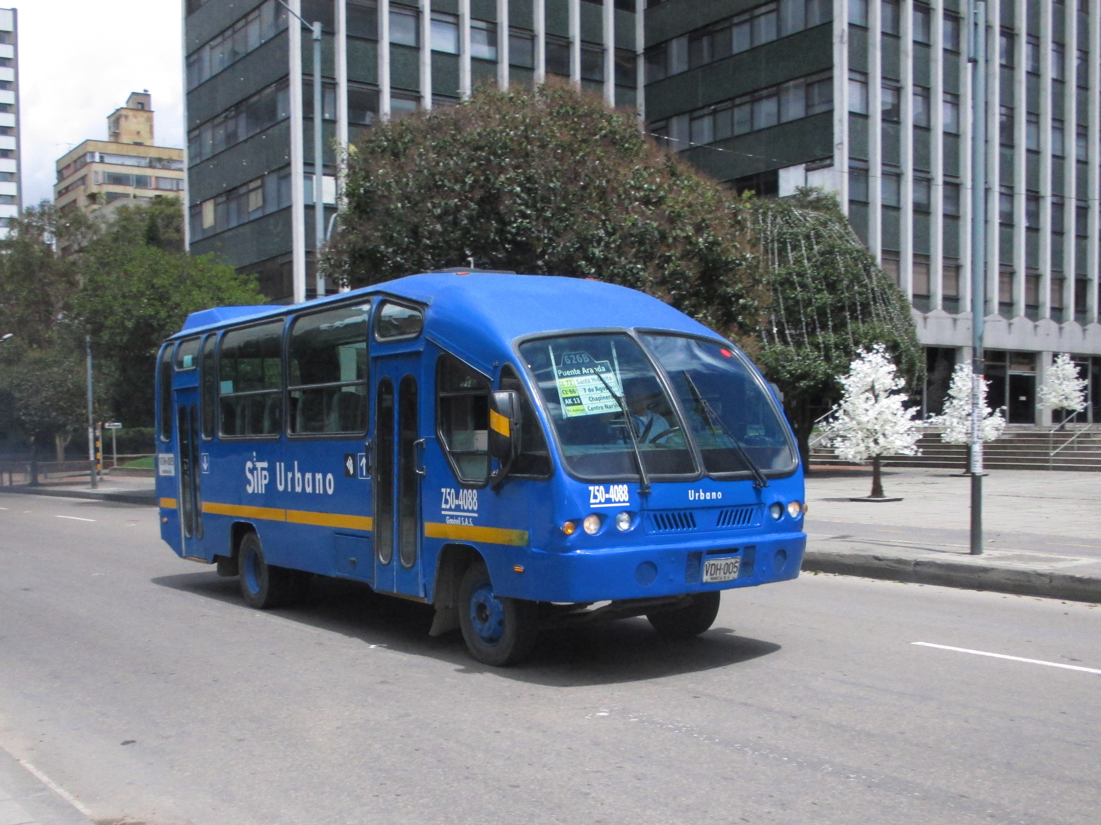 Bogotá buseta SITP, carrera 13 calle 37